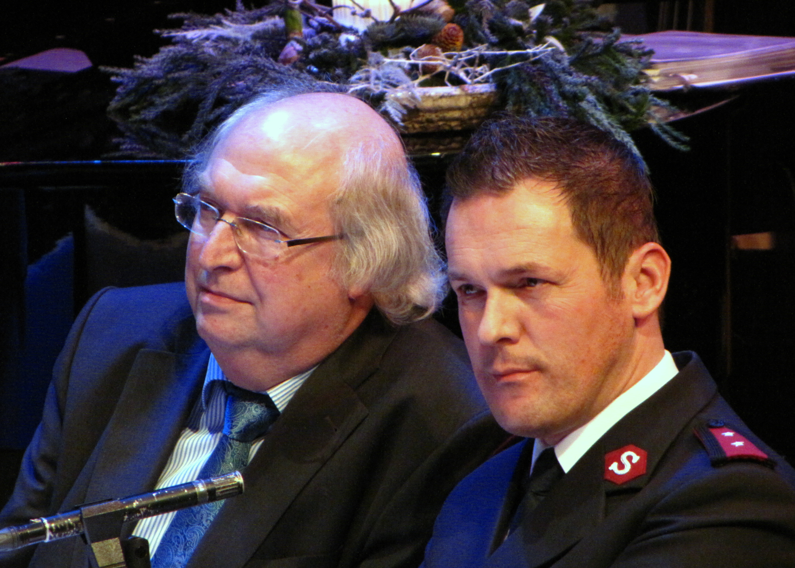 Derde "Piment", politiek café. Amphion, Doetinchem. Ad van Liempt (documentairemaker), Robert Paul Fennema (Leger des Heils).